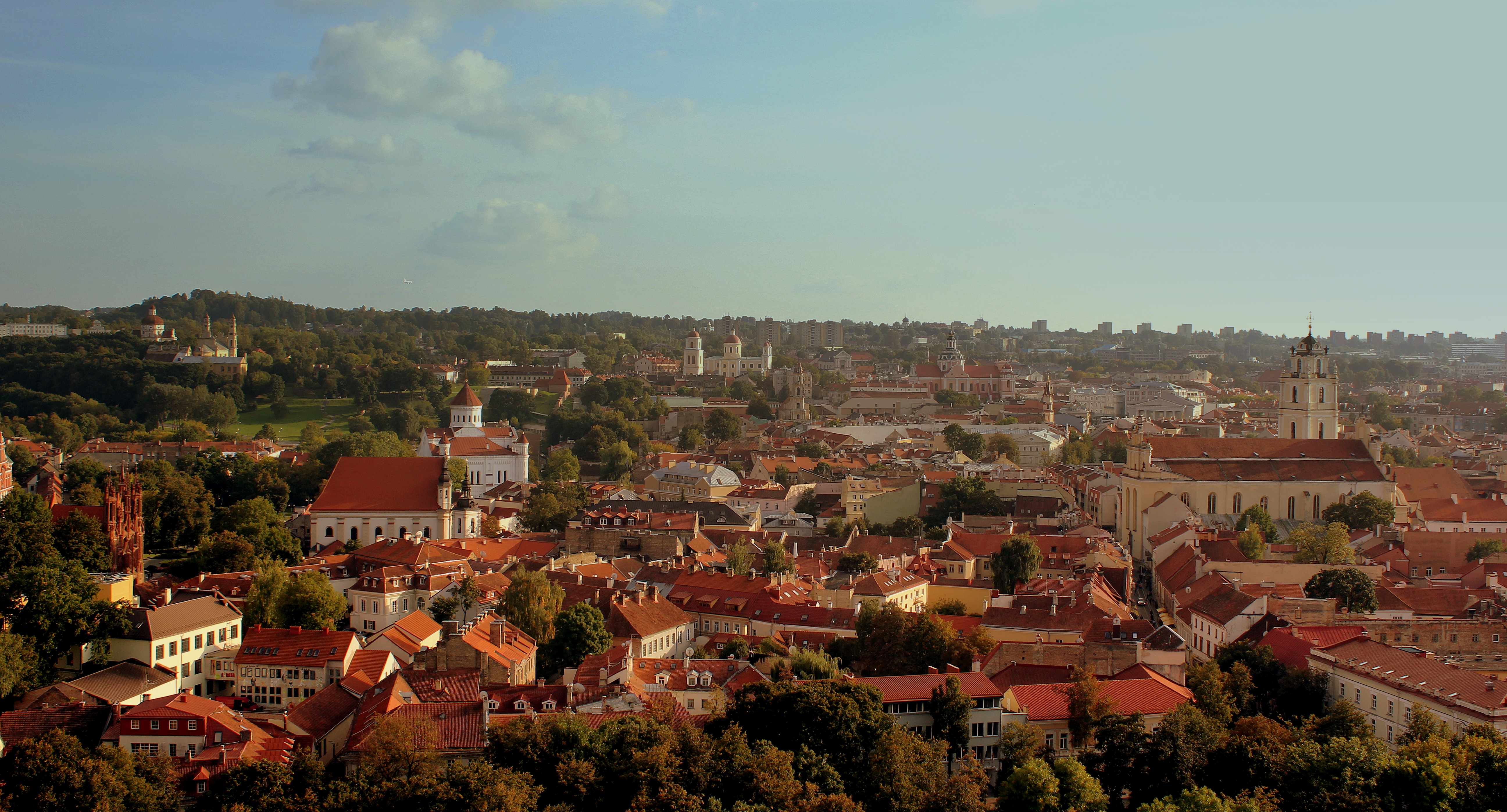 VILLINUS OLD TOWN LITHUANIA SEP 2013